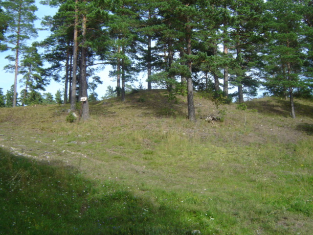 Kärla Lihulinna välisnõlv